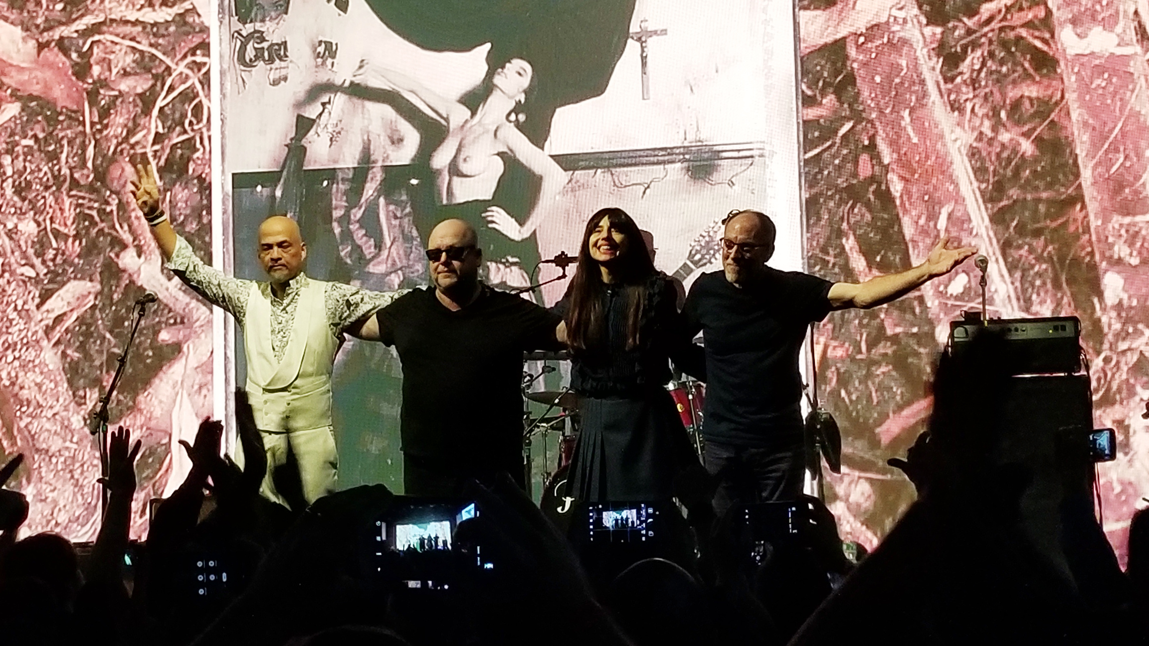 Pixies @ Brooklyn Steel, Brooklyn, 11/19/2018